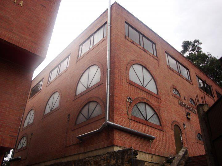 amphitheater